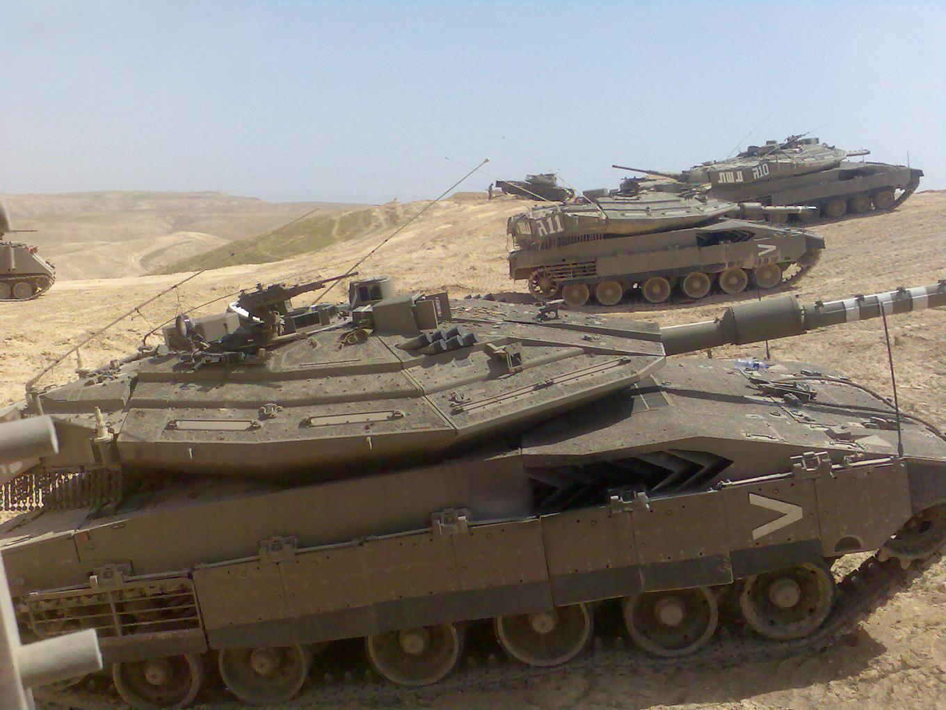 Merkava tank Mk IV